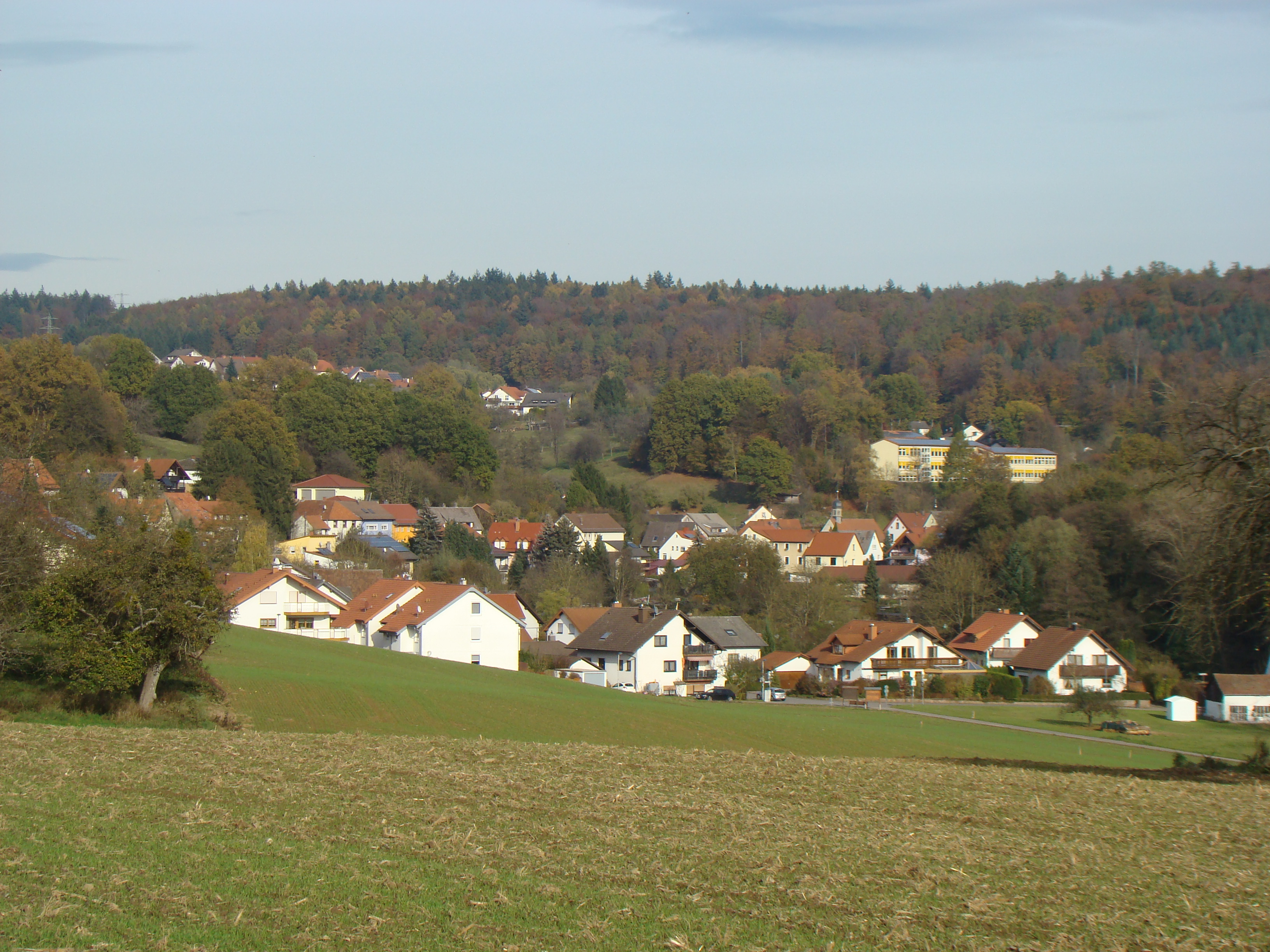 Lobbach-Waldwimmersbach